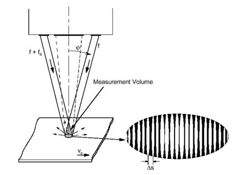 Darstellung des LSV-Messprinzip